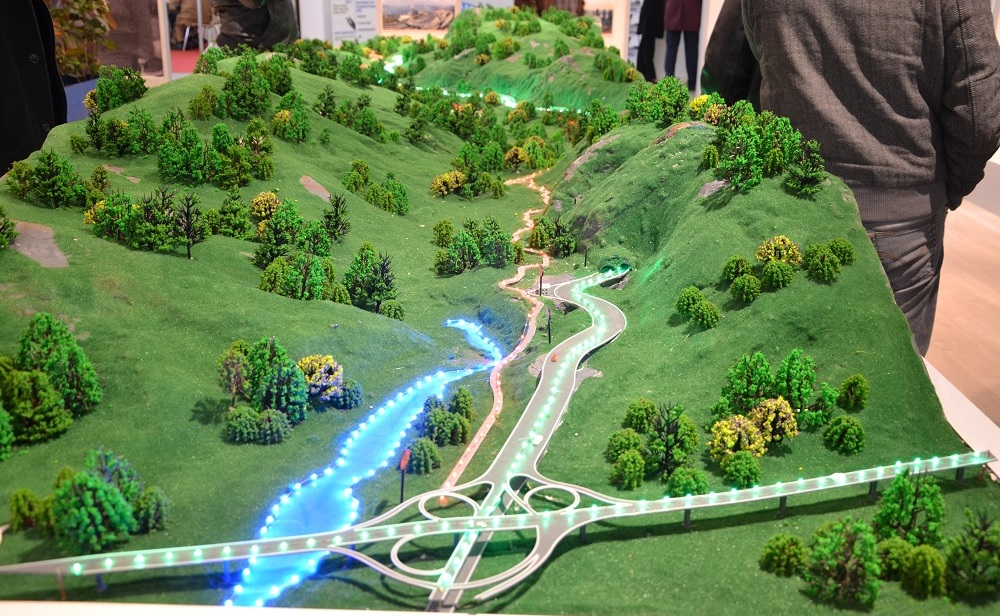 Maquette de l'Autoroute Nord Sud au niveau de la chiffa à son embranchement avec l'Autoroute Est-Ouest